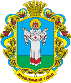 Герб Жашківського району Черкаської області